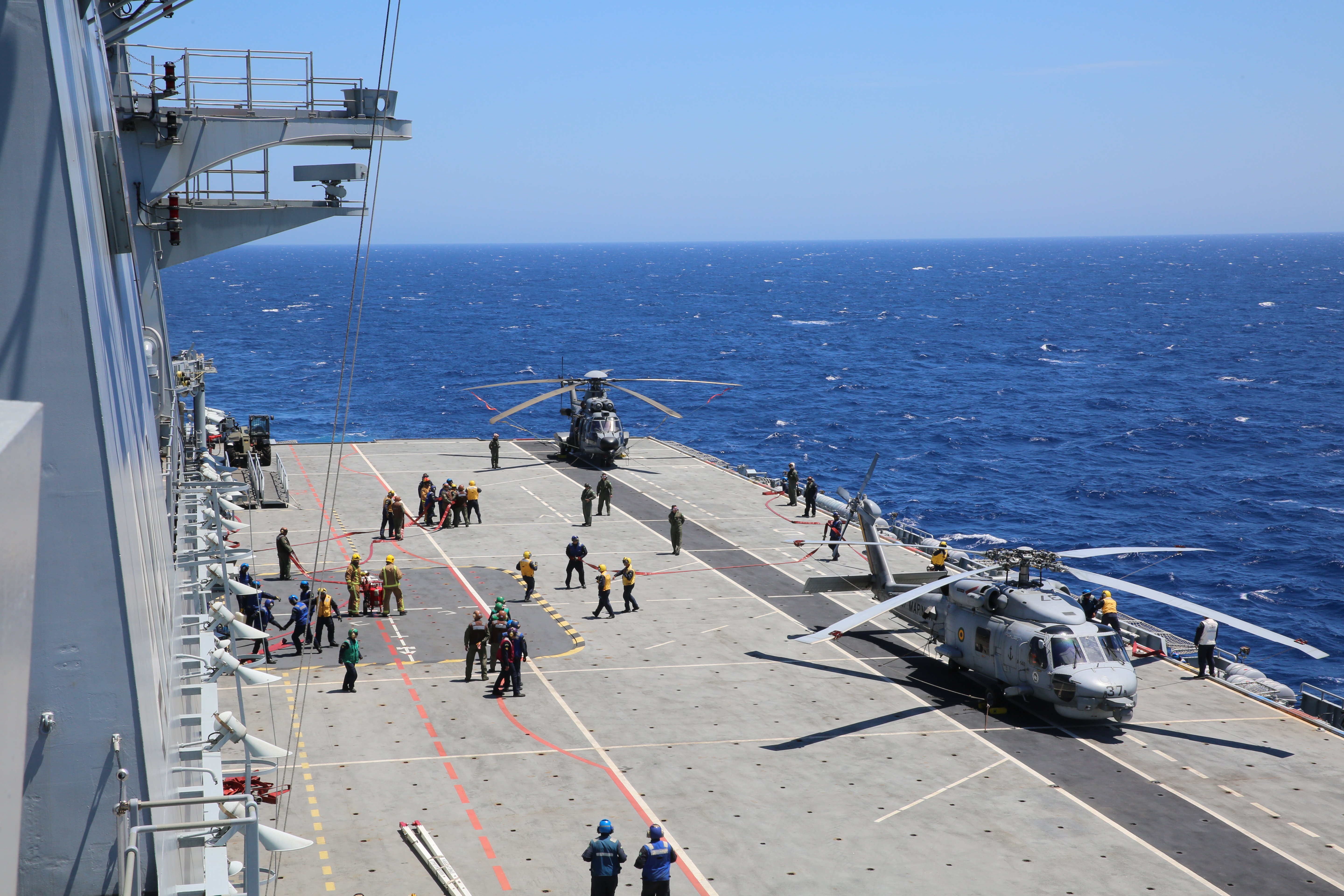 Arquivo liberado pela Marinha do Brasil através de projeto GLAM com Wiki Educação Brasil